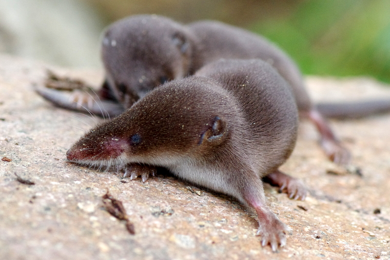 Młode ryjówki aksamitne (Sorex Araneus)